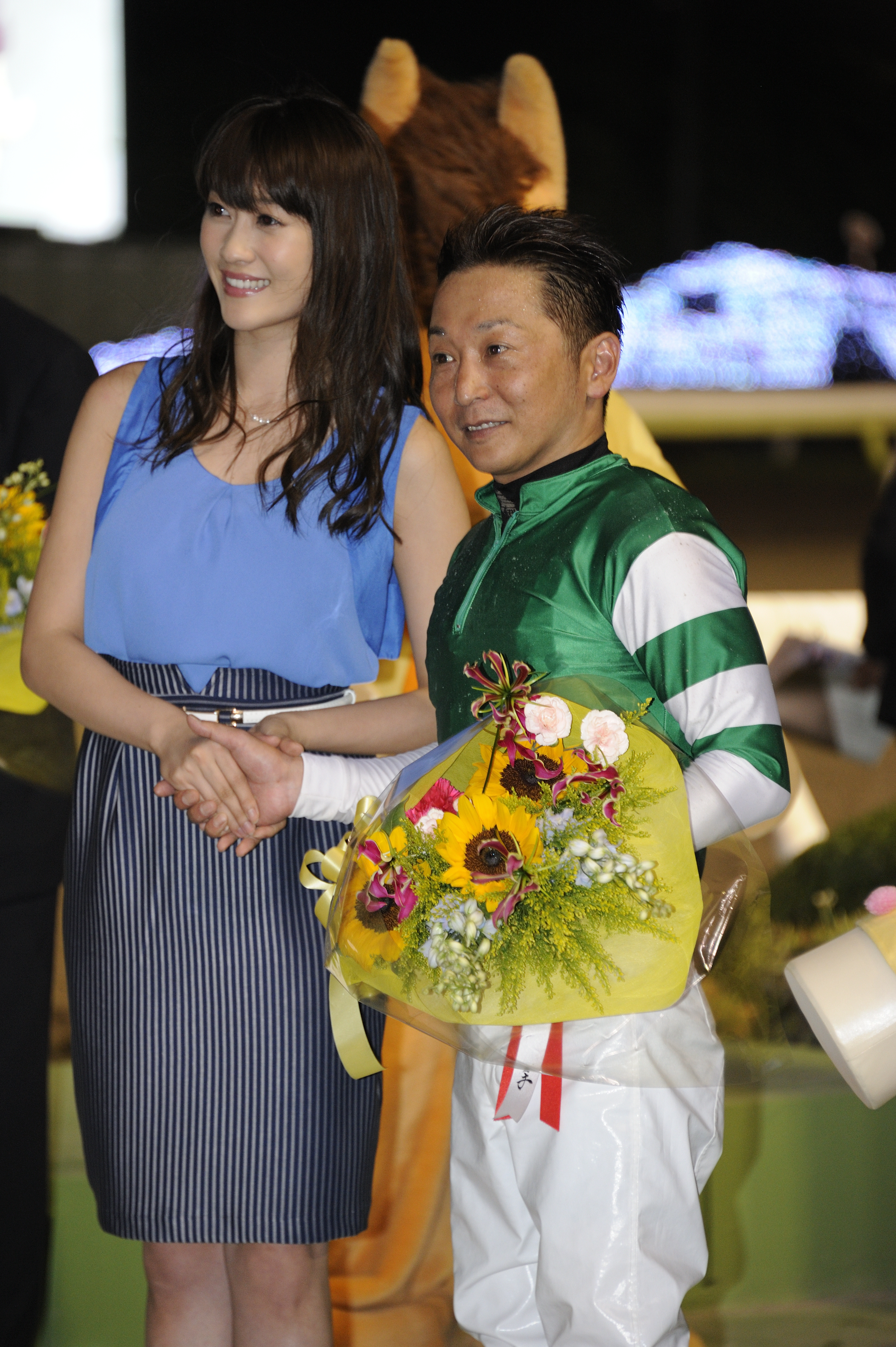 2015年6月3日、東京ダービーを制した今野忠成とプレゼンターを務めた原幹恵